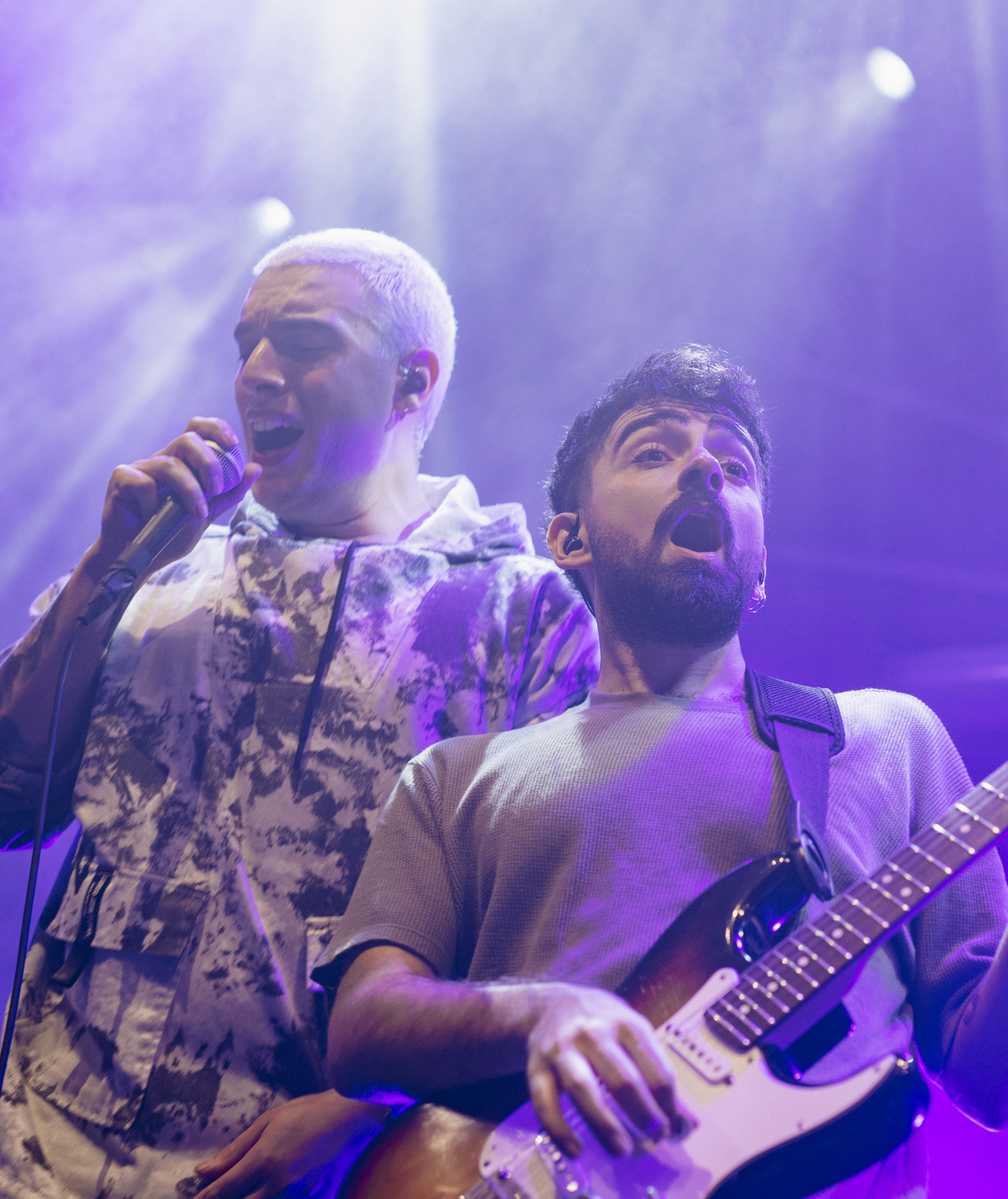 Dolu Kadehi Ters Tut, Zorlu PSM konserlerinden